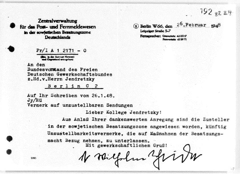 Brief der unter der SMAD agierenden Zentralverwaltung für Post- und Fernmeldewesen an den Bund der Freien Gewerkschaften. Unterschrieben von ZVPF-Direktor Wilhelm Schröder.